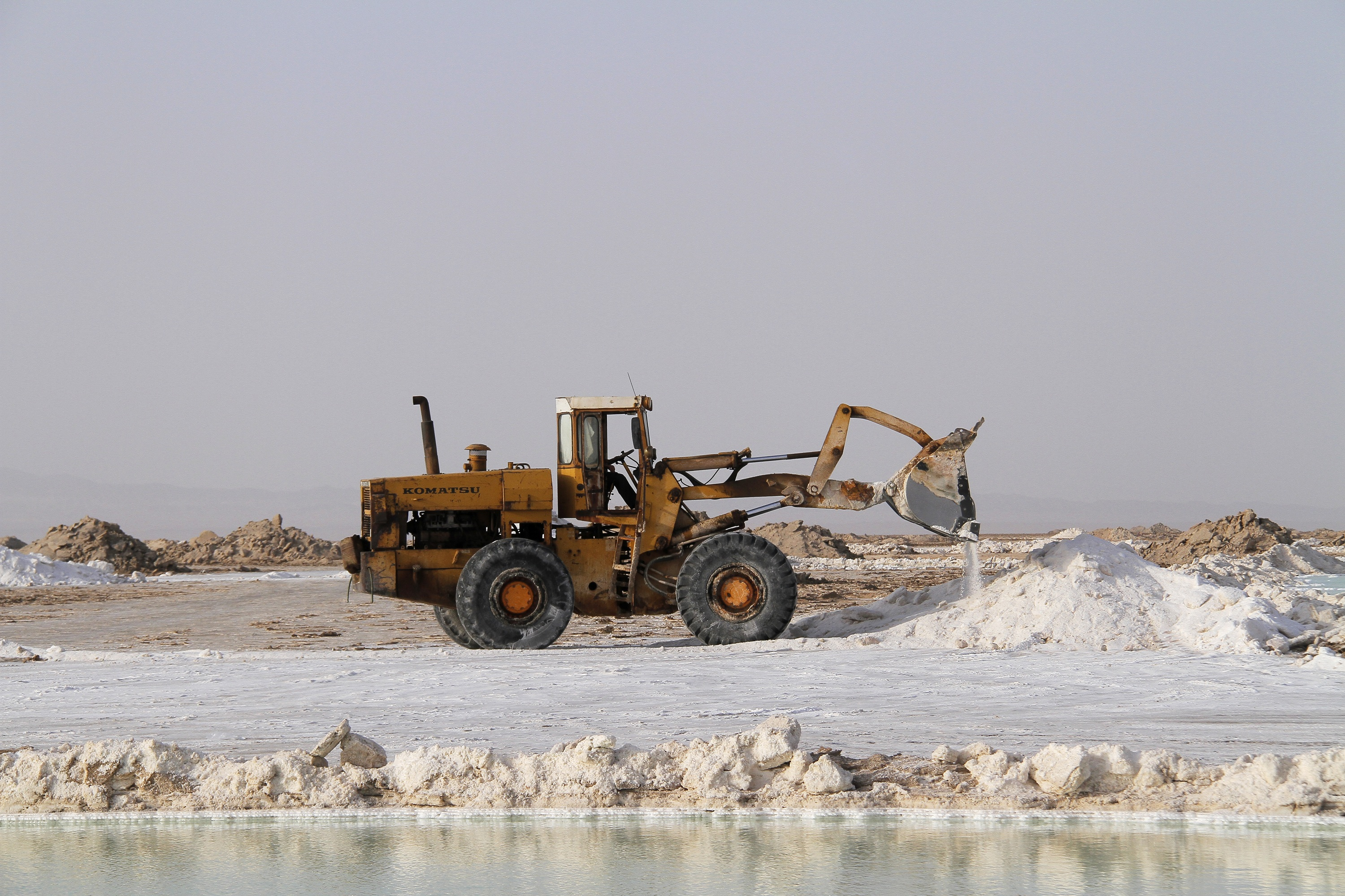 استخراج نمک در دریاچه نمک، تابستان 2016